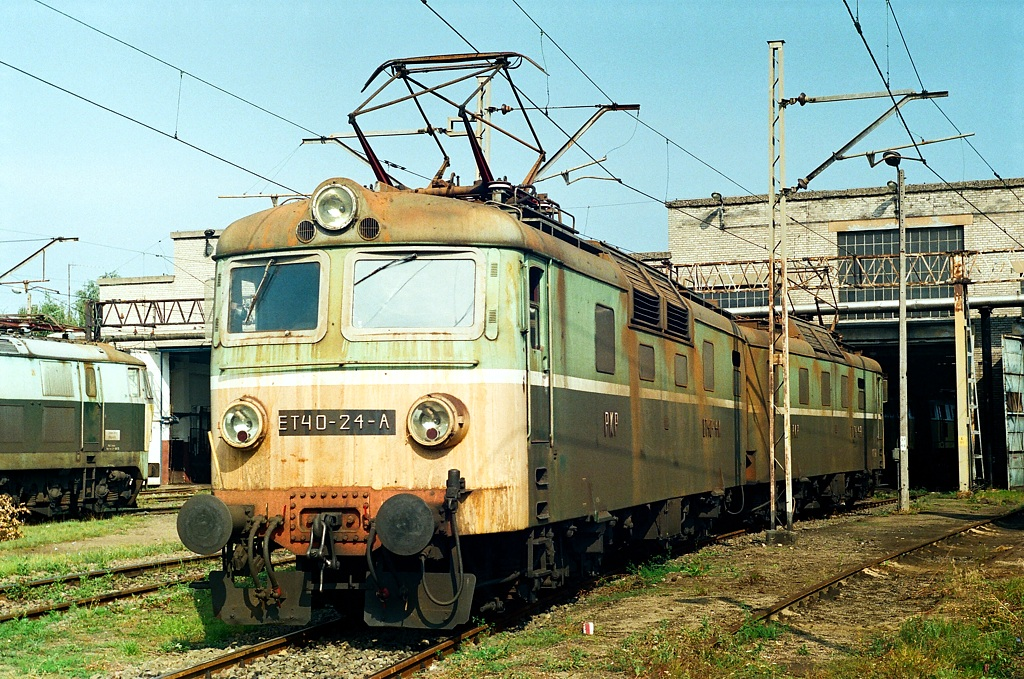 Lokomotywa elektryczna ET40-24 stoi na terenie Zakładu Taboru w Bydgoszczy.